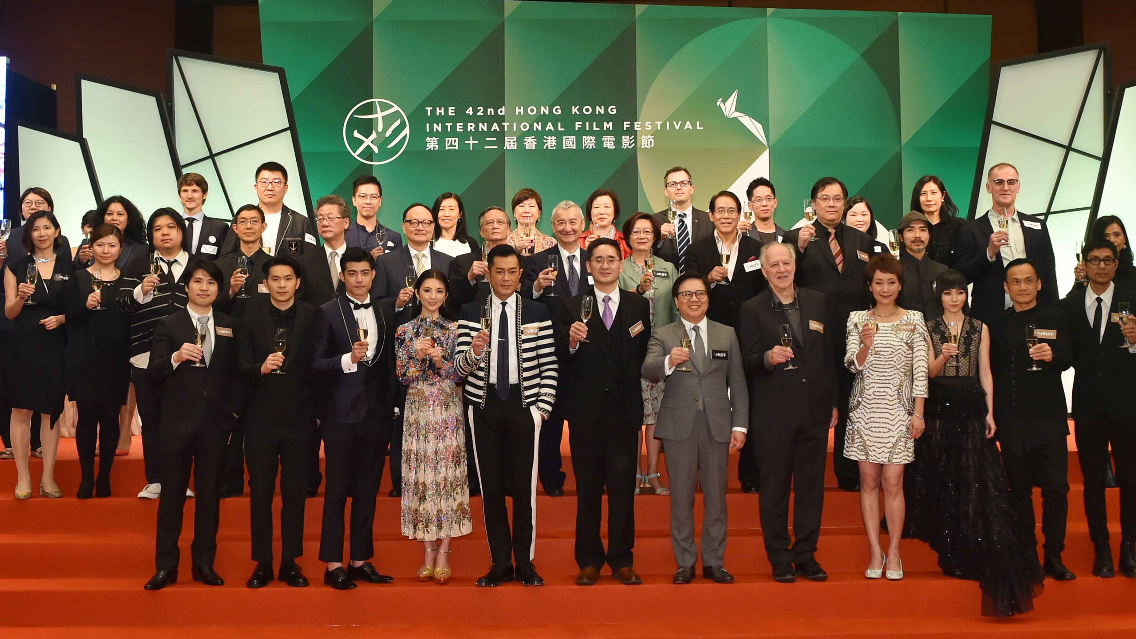 中文（香港）: 第四十二屆香港國際電影節開幕典禮祝酒儀式